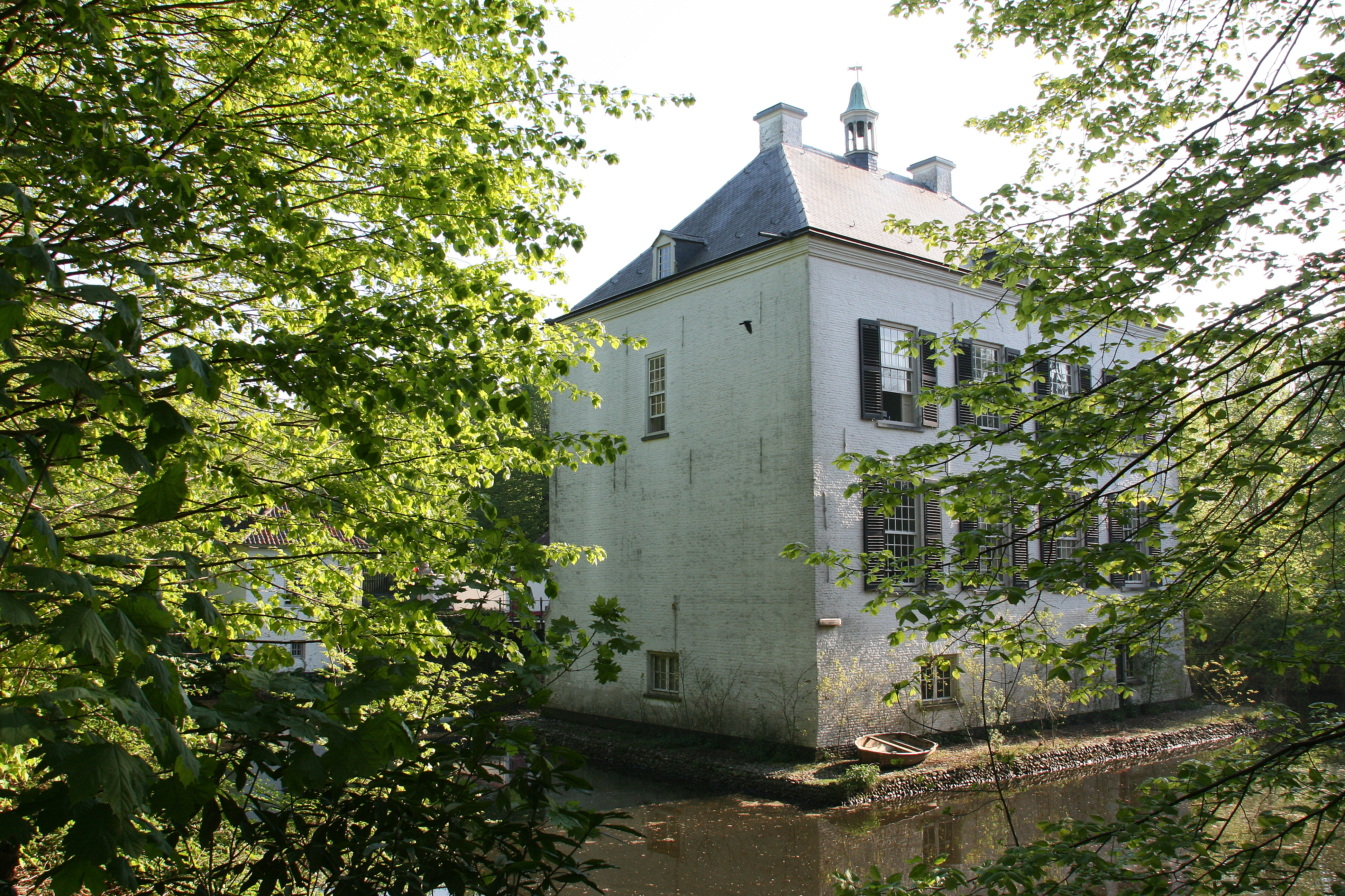 Loon op Zand - Kasteellaan 17 - Kasteel Loon op Zand